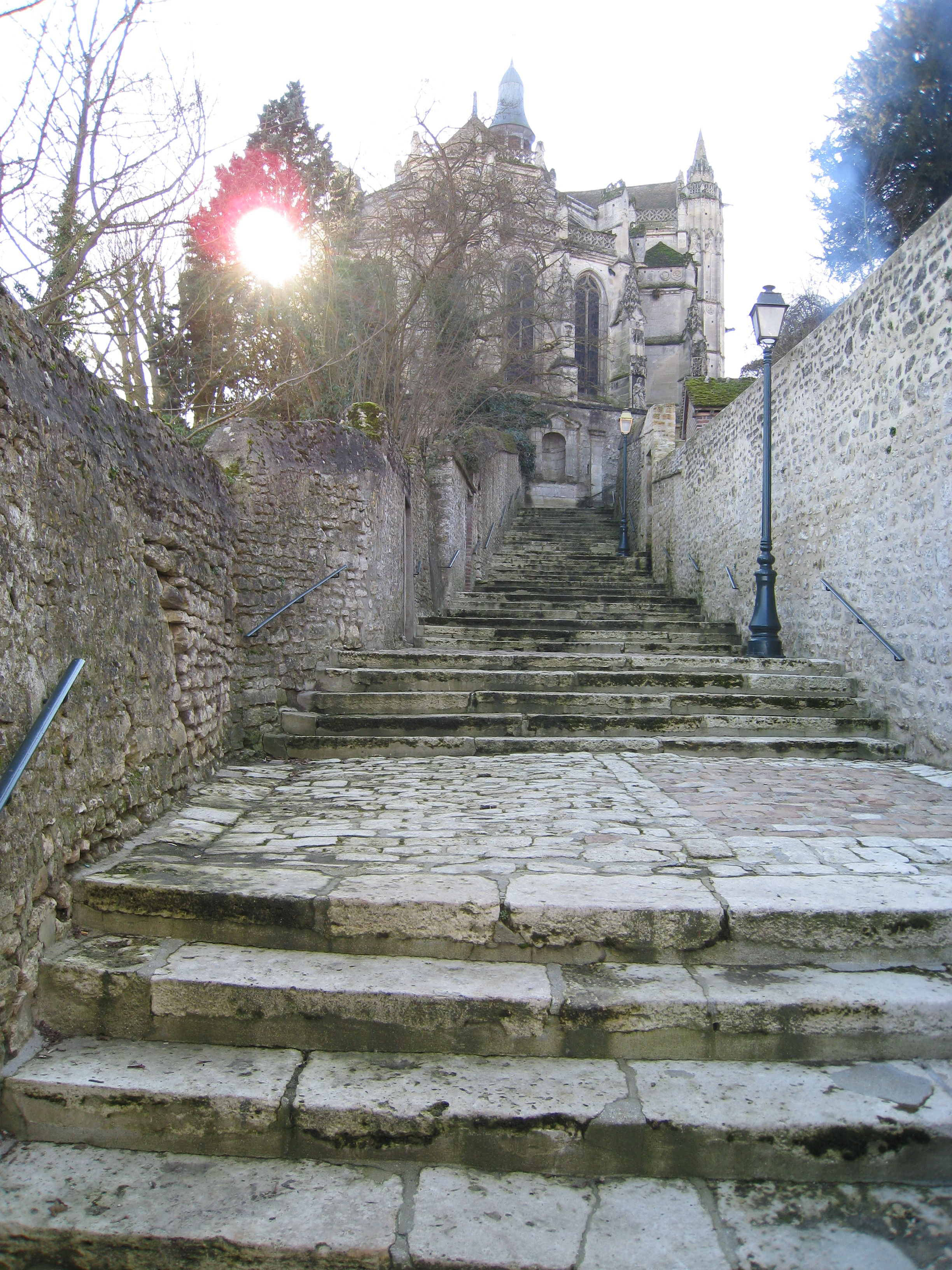 Escaliers de la rue de l'église, Chaumont en vexin, Oise, France